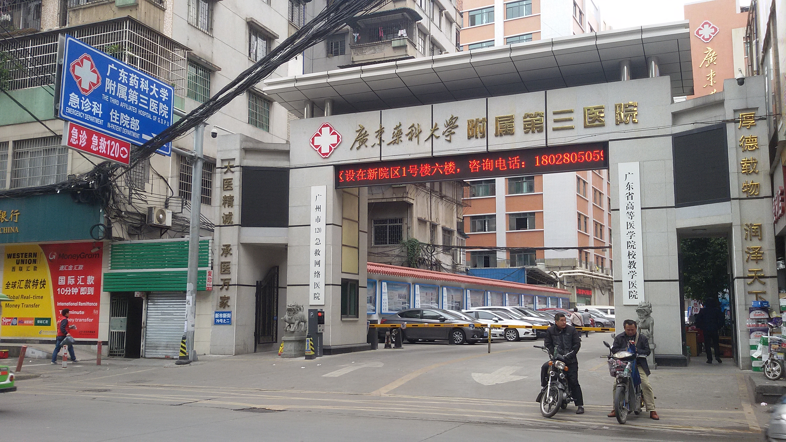 粵語: 廣東藥科大學附屬第三醫院